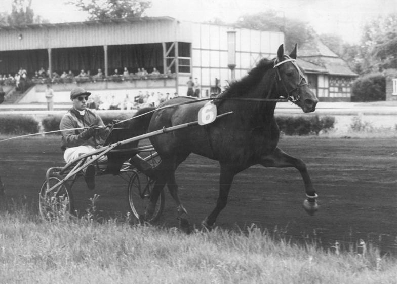 Gerhard Krüger Zentralbild Wendorf 10.6.1957 Dreijährigen-Elite-Preis in Karlshorst Im Mittelpunkt der Pfingsttrabrennen in Berlin-Karlshorst stand am Sonntag, dem 9.6.1957, der Dreijährigen-Elite-Preis, ein Zuchtrennen über 2.600 Meter. Siegerin wurde Rosalena mit dem Fahrer G. Krüger. UBz:Der deutsche Meisterfahrer G.Krüger mit Rosalena während des Rennens.